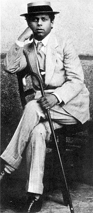 Max Reinhardt